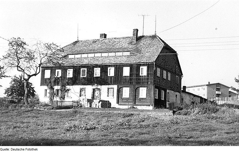 Original image description from the Deutsche Fotothek Ebersbach/Sachsen. Ehem. Hainbergwindmühle, Gehöft